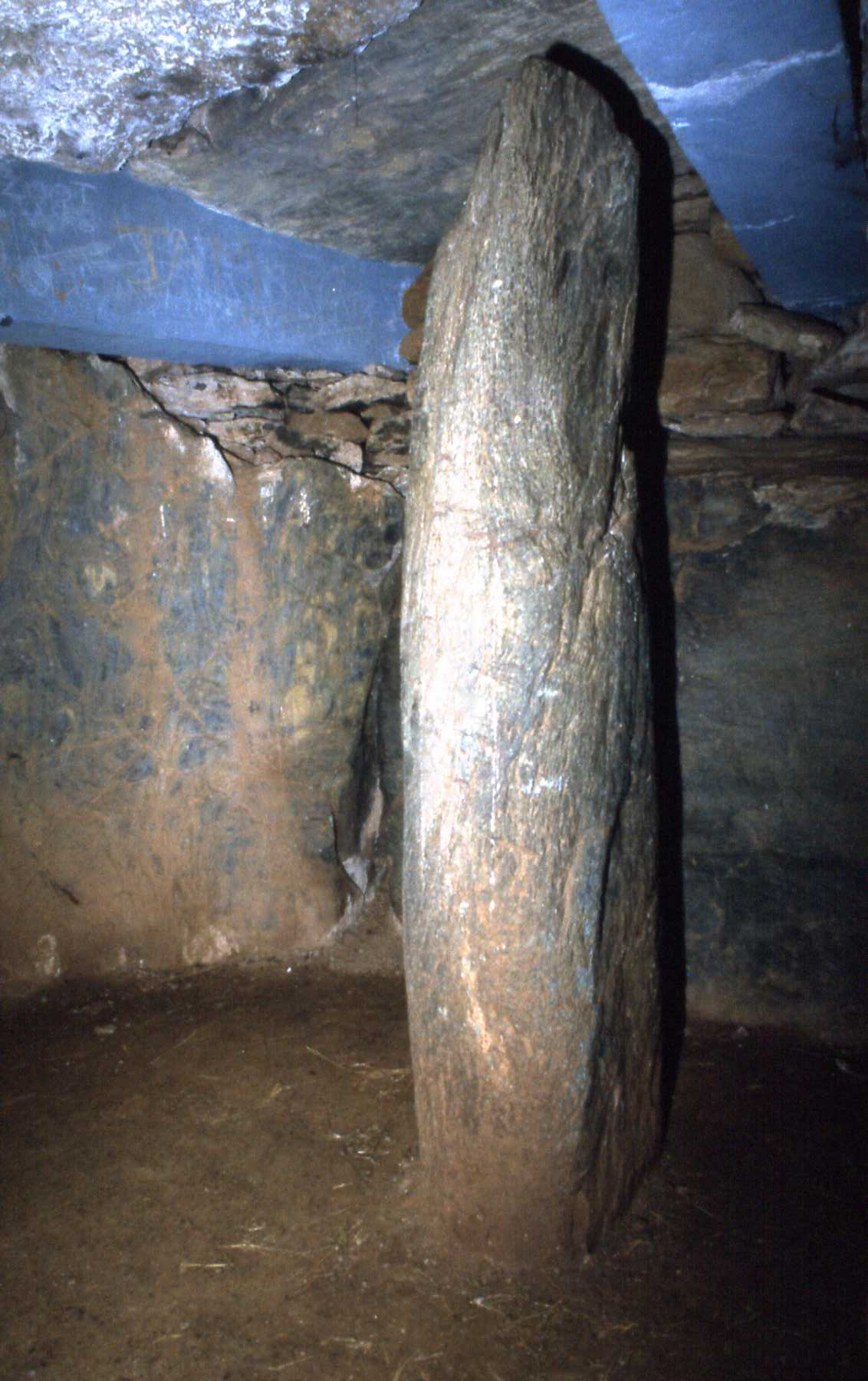 Innenansicht